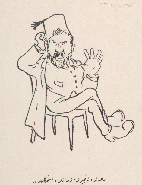 Sedat Nuri'nin Abdullah Cevdet çizimi This work first published in the Ottoman Empire is now in the public domain because the Empire's copyright formalities were not met (copyright notice, registration, and deposit), or because the copyright term (30 years after the death of the author, sometimes less) expired before the Empire was dissolved (details). This work is in the public domain in Turkey because it has been expropriated as national heritage or its copyright has expired. Article 27 of the Turkish copyright law states: The protection period continues during the lifetime of the owner of the work and for 70 years after his death. For works published after the death of their owner, the protection period is 70 years after the date of death. In cases stated in the first paragraph of article 12, the protection period is 70 years from the date that the work is published, unless the owner of the work discloses his name before the expiry of this period. In case the first owner of the work is a legal person, the protection period is 70 years from the date that the work is published.